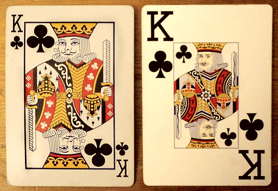 Vergleich des Indexs von Spielkarten